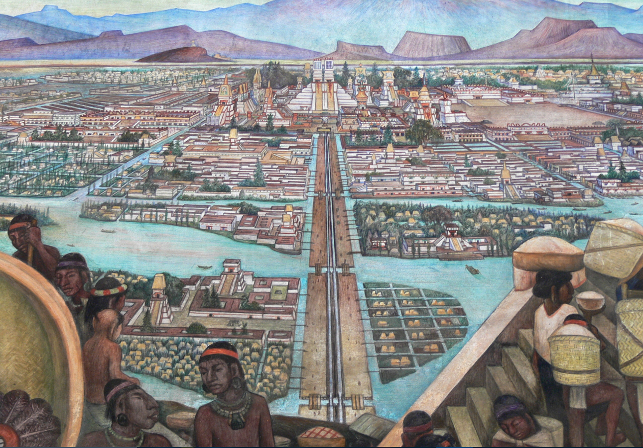 Donde ocurre la matanza del templo mayor